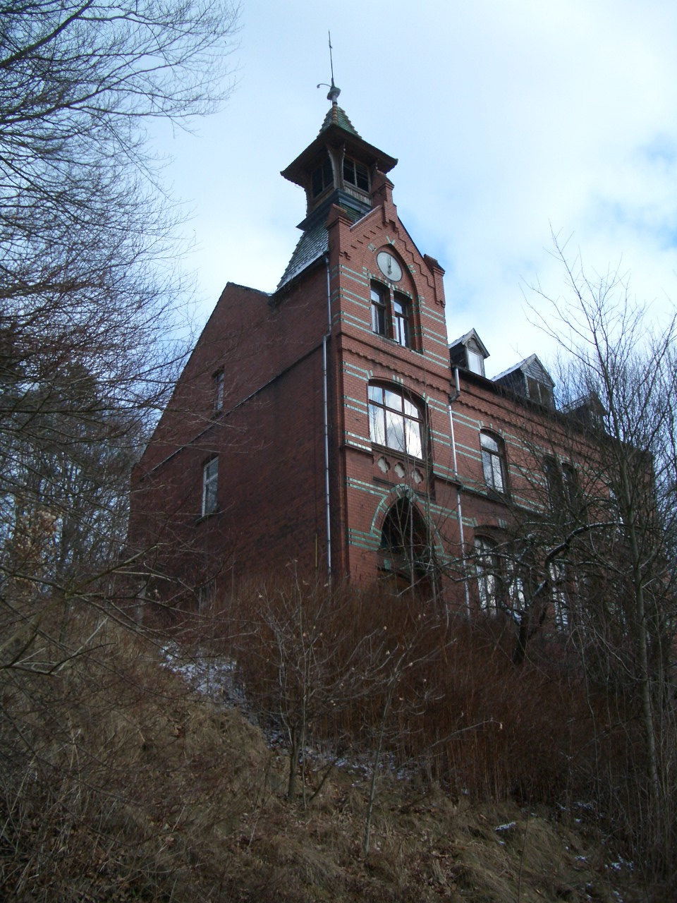 Weißensand, Lengenfeld? – Eine "Alte Schule" sucht einen Käufer - zwei Etagen mit paar schönen großen Räumen ...